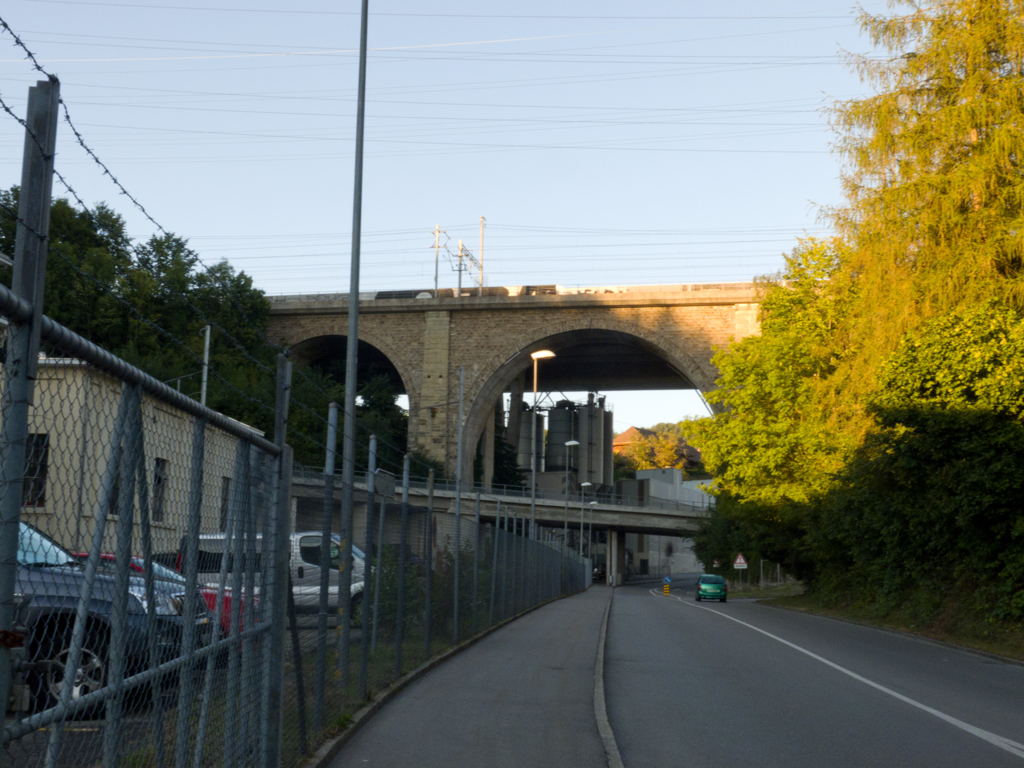 Die Kantonsstrasse unterquert RBS- und die SBB-Linie, sowie die Autobahn und eine Velobrücke